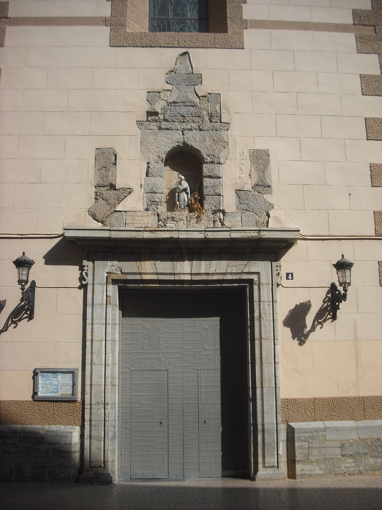 Placa dels caiguts a l'església de Sant Antoni.